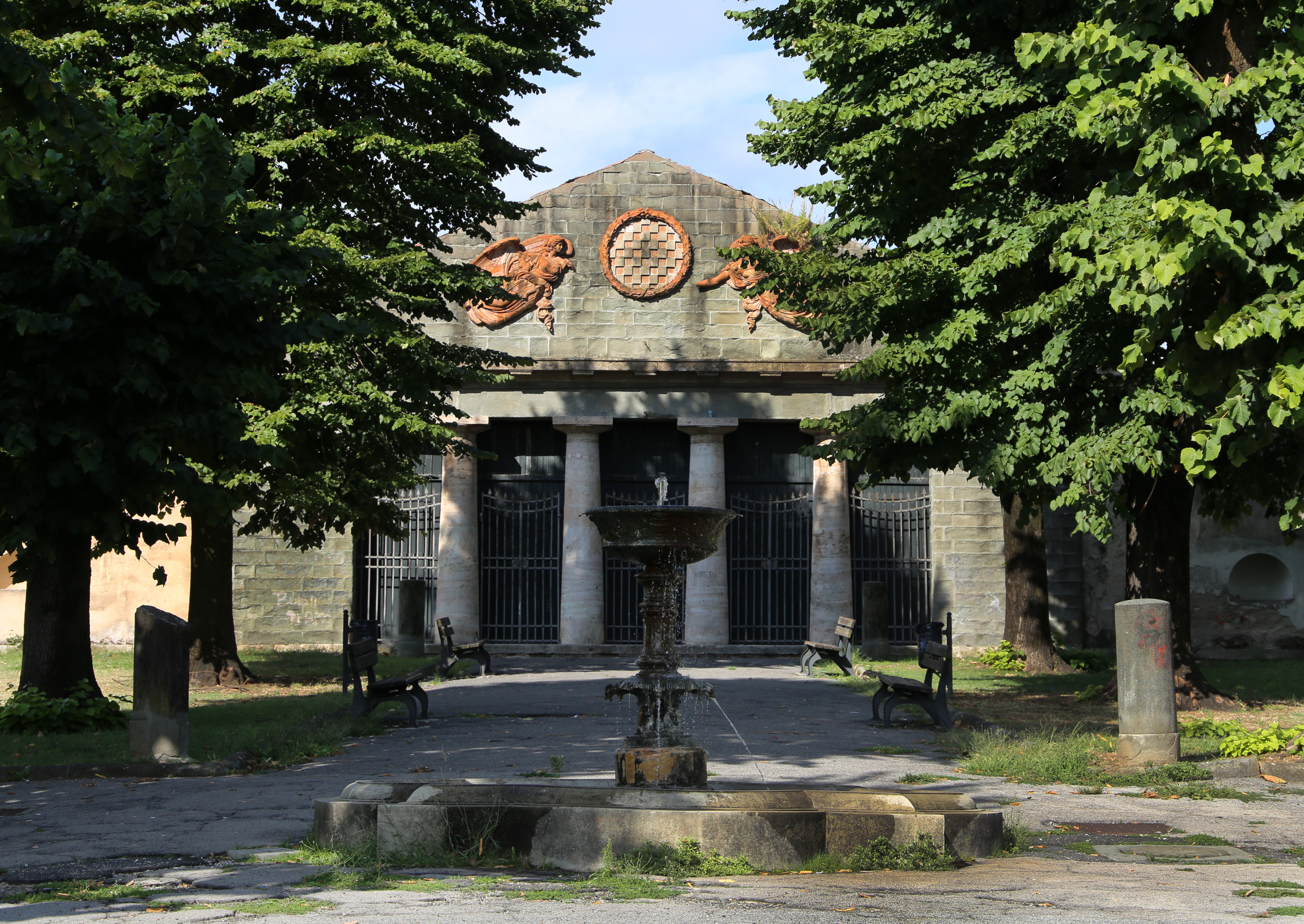 Pantheon degli uomini illustri This is a photo of a monument which is part of cultural heritage of Italy.